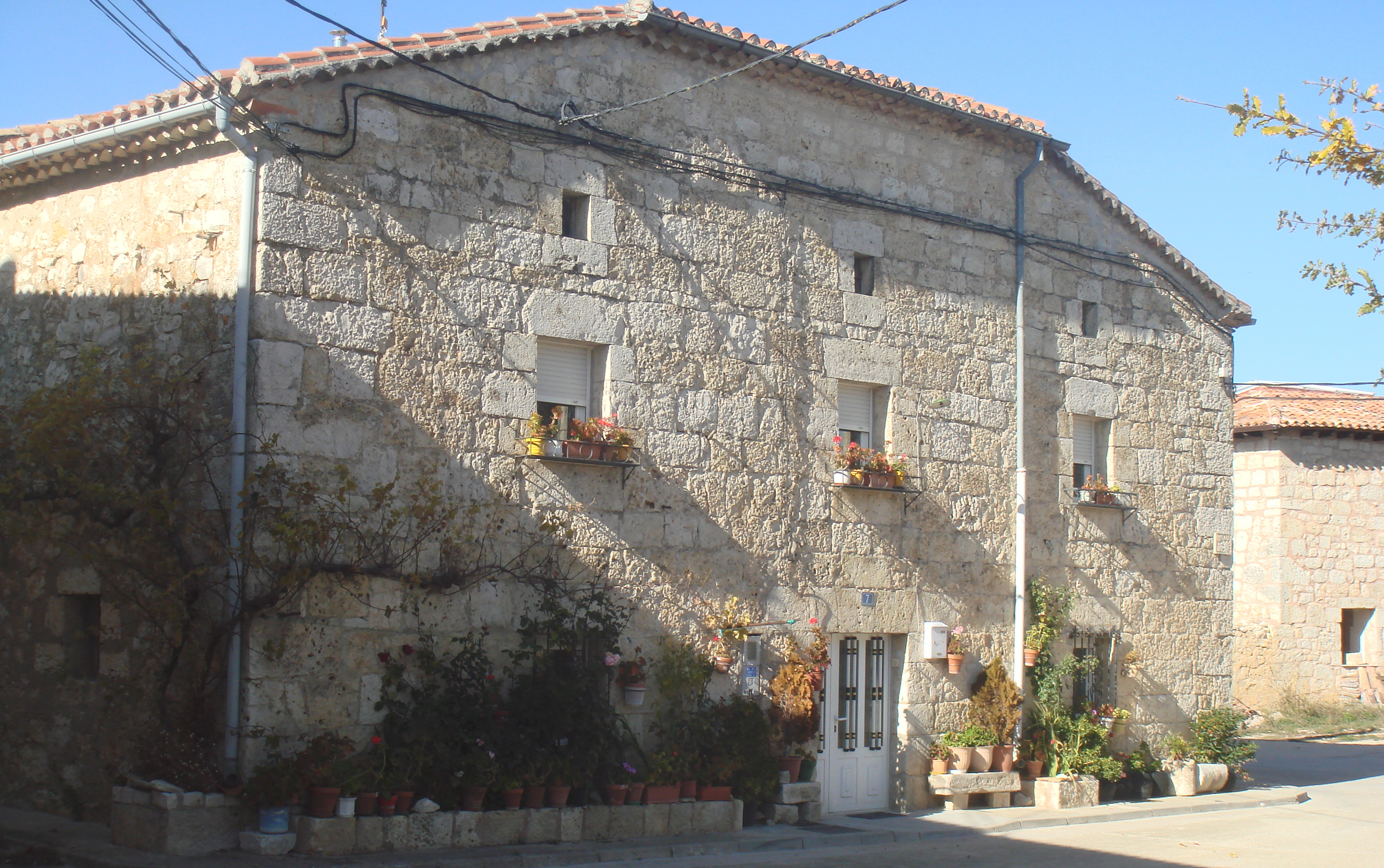 Arquitectura popular, Carcedo de Burgos, España.